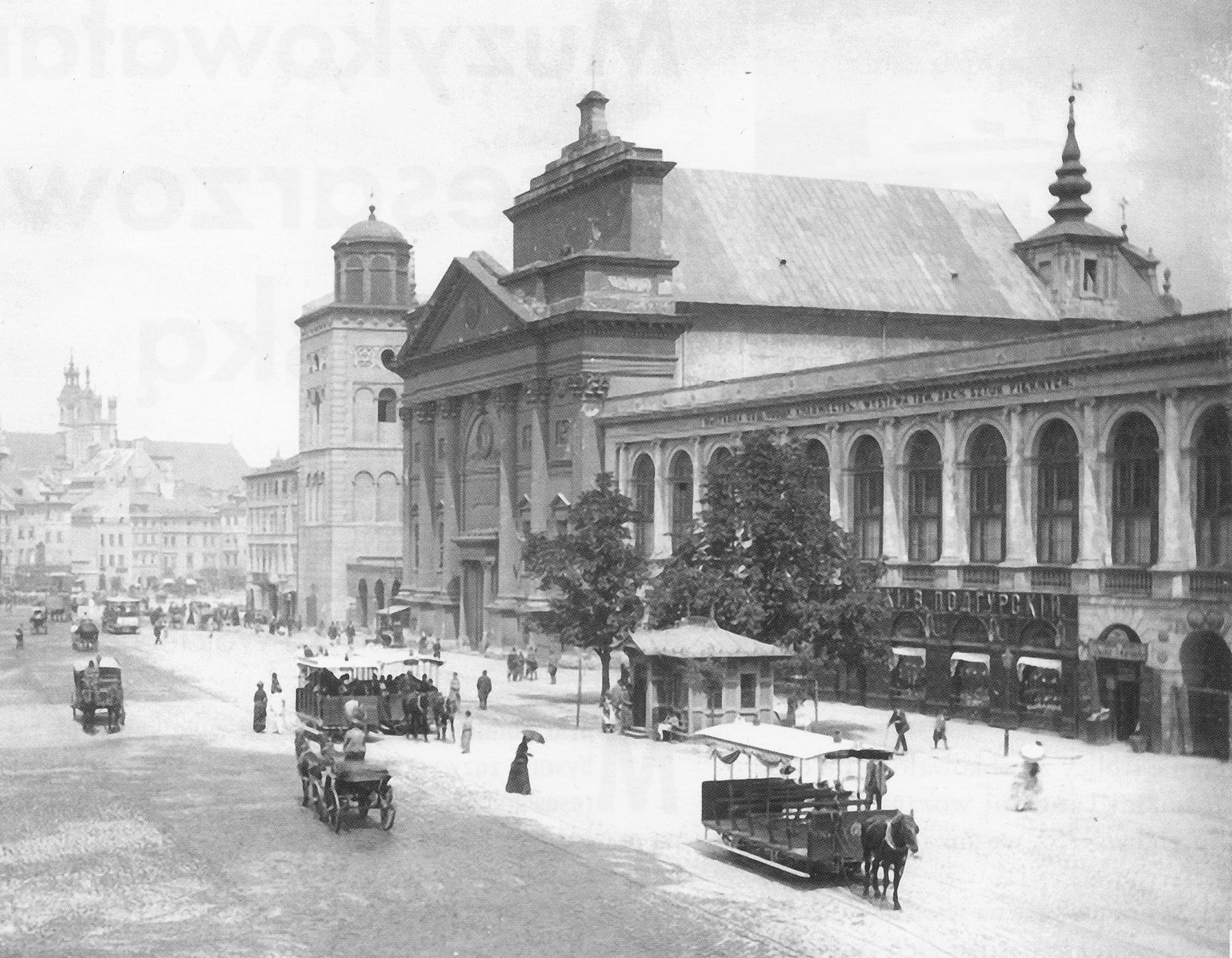 Widok Krakowskiego Przedmieścia z kościołem św. Anny w Warszawie